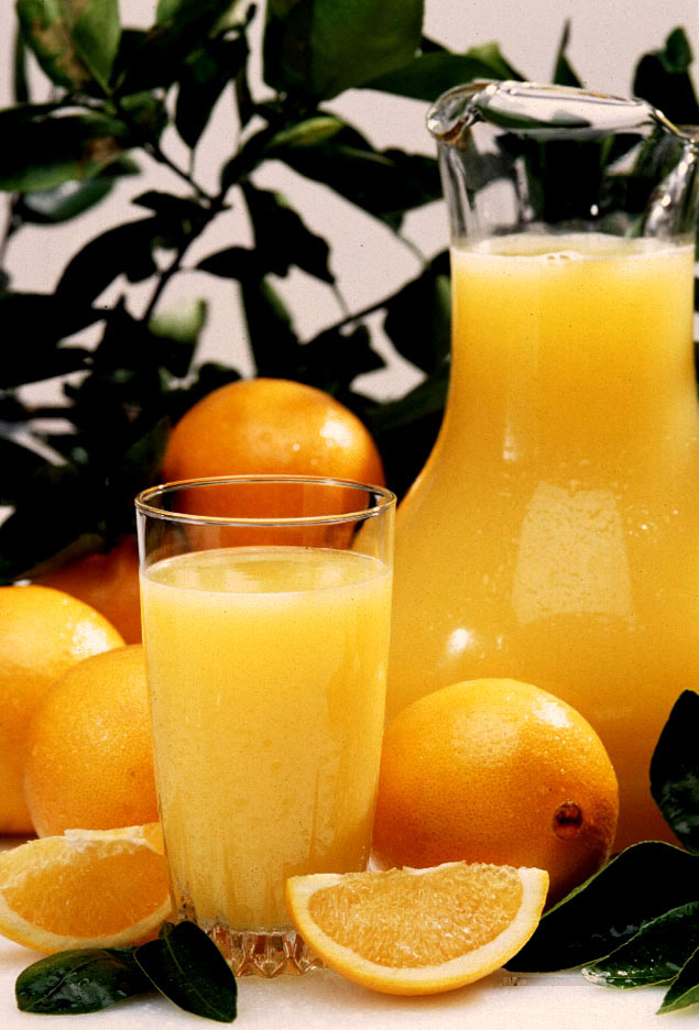 Sinaasappels en sinaasappelsap. Foto: US Department of Agriculture. Publiek domein. Download vanaf